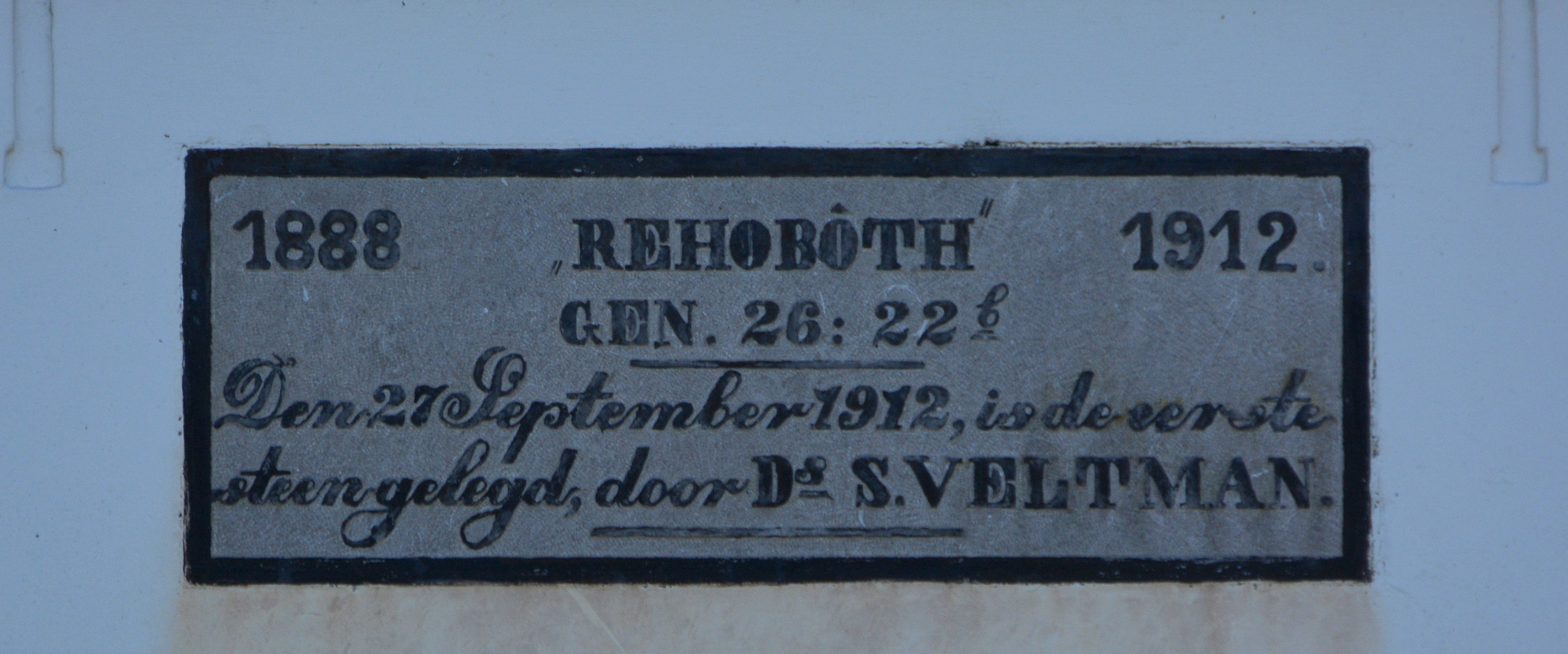 Mitselwier, PKN-tsjerke (foarhinne grifformeard) Rehoboth, gevelstien